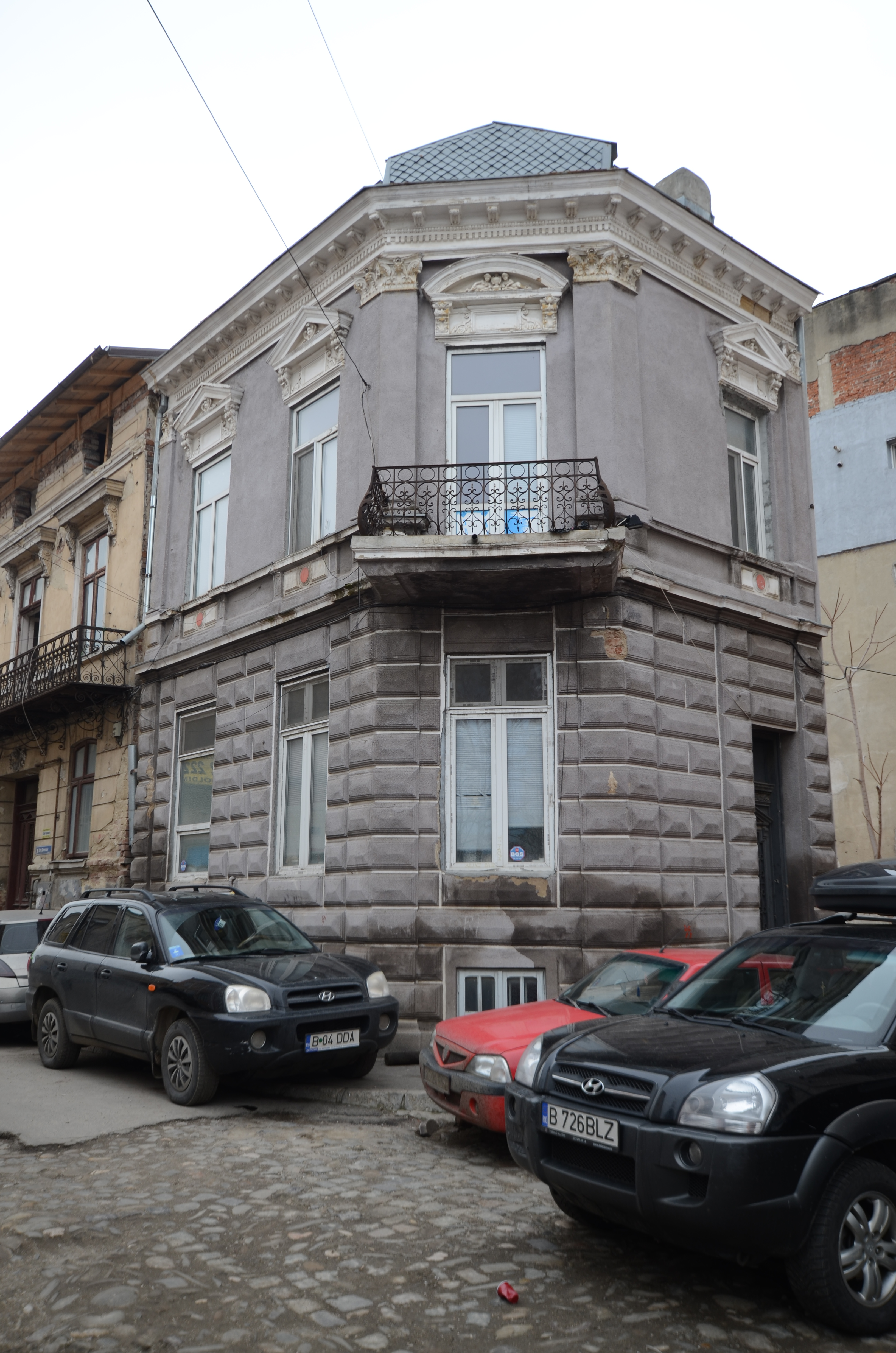 Casă, Str. Nicolae Mavrogheni nr. 6, București